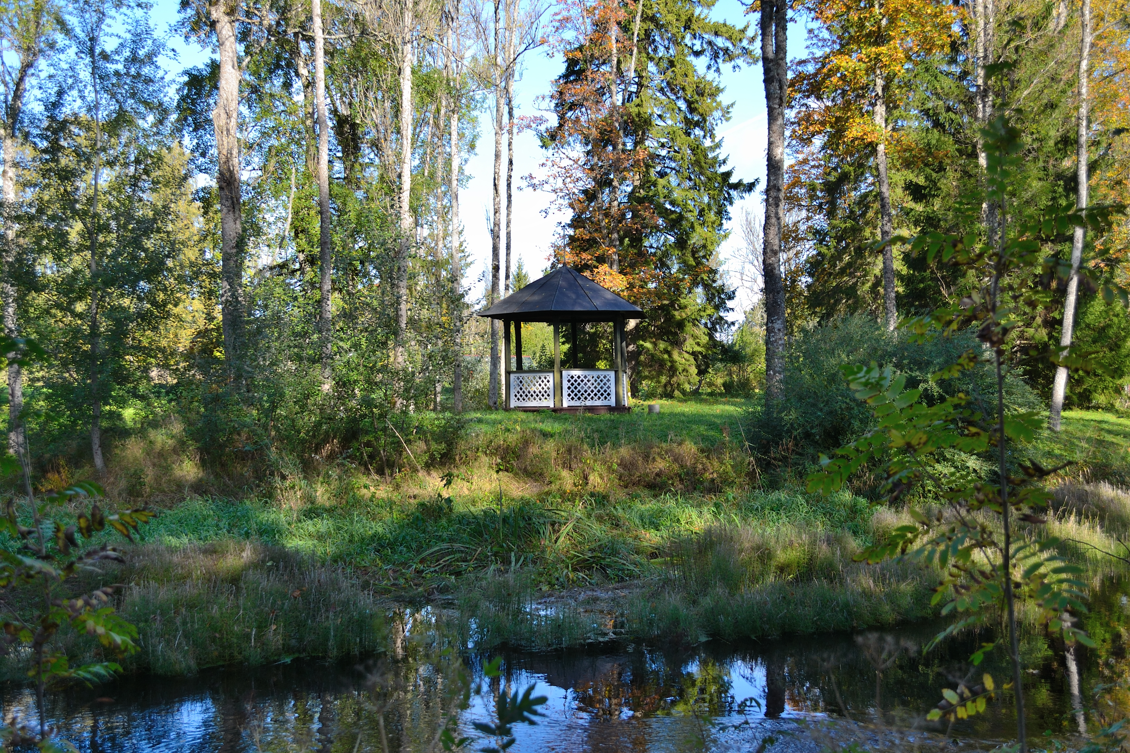 Pirgu mõisa park